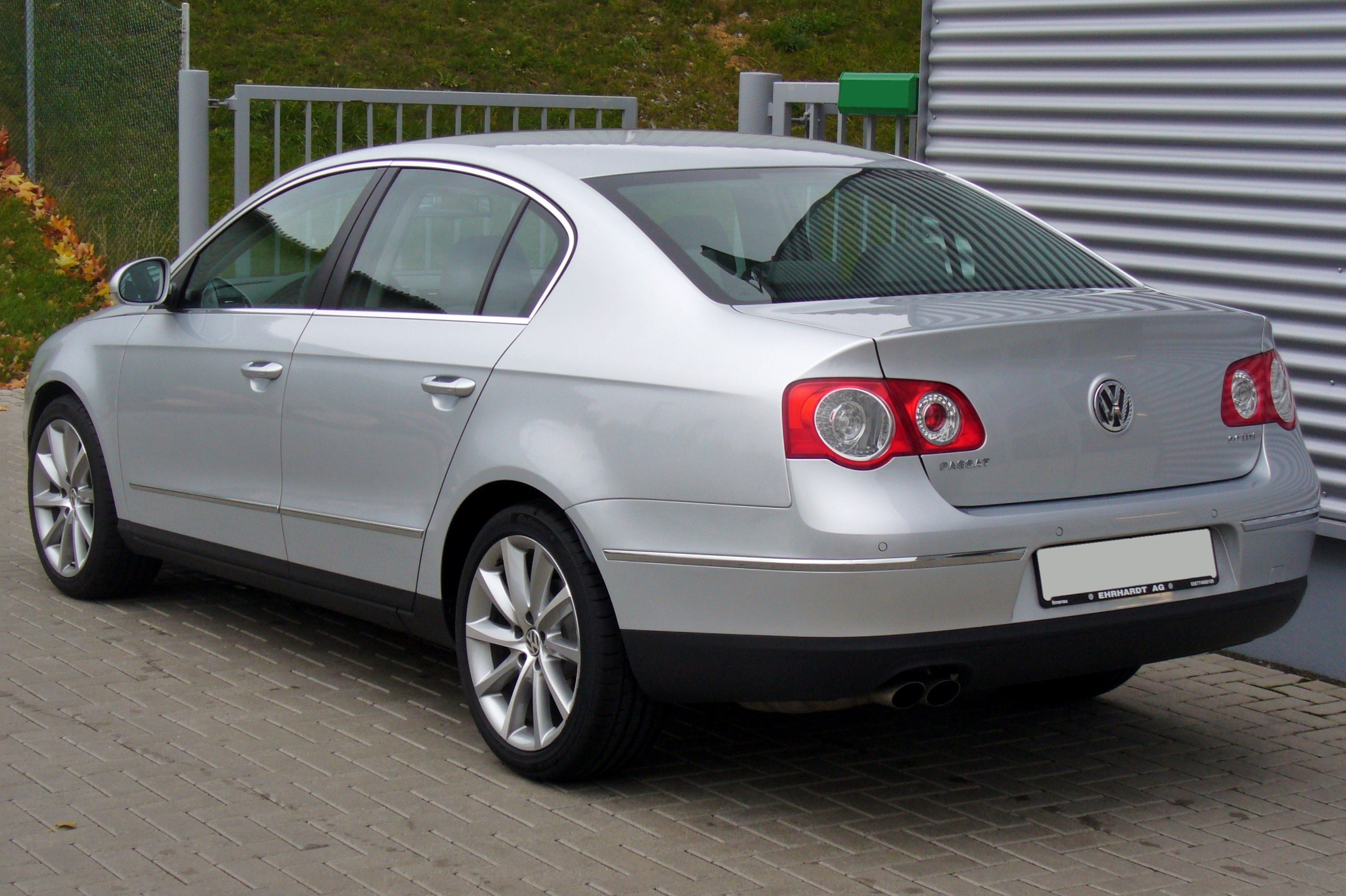 VW Passat B6 Limousine